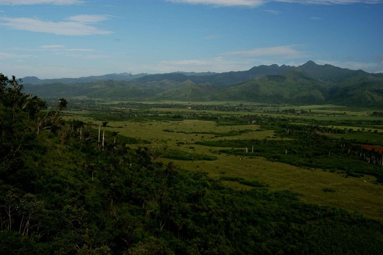 Sierra del Escambray, Cuba, september 2005, info in de Metadata